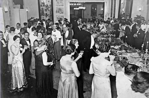 Guests at the Macao Military Club enjoy a ‘CHÁ GORDO’ feast in the 1930s.